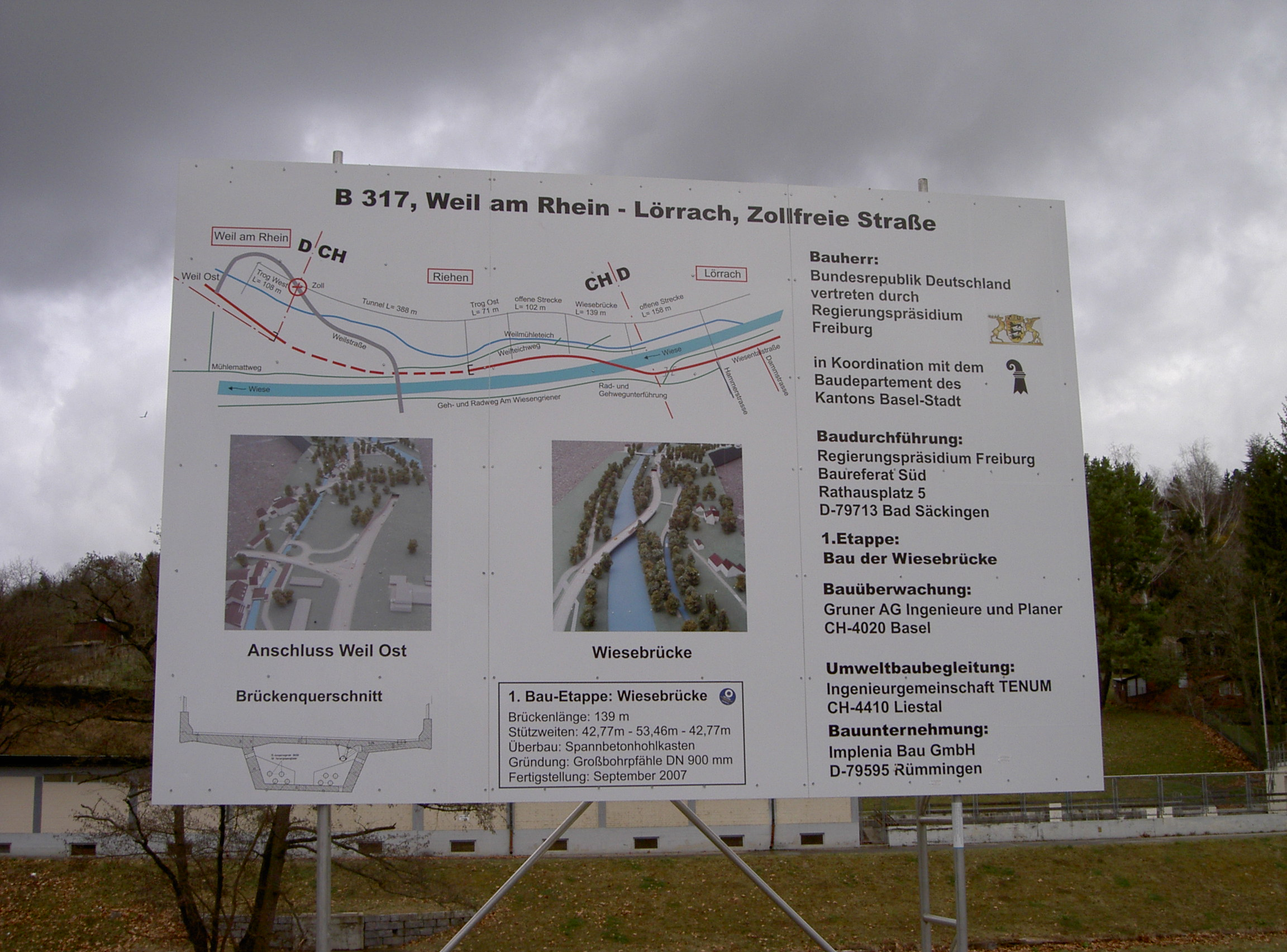 Infotafel Zollfreie Strasse